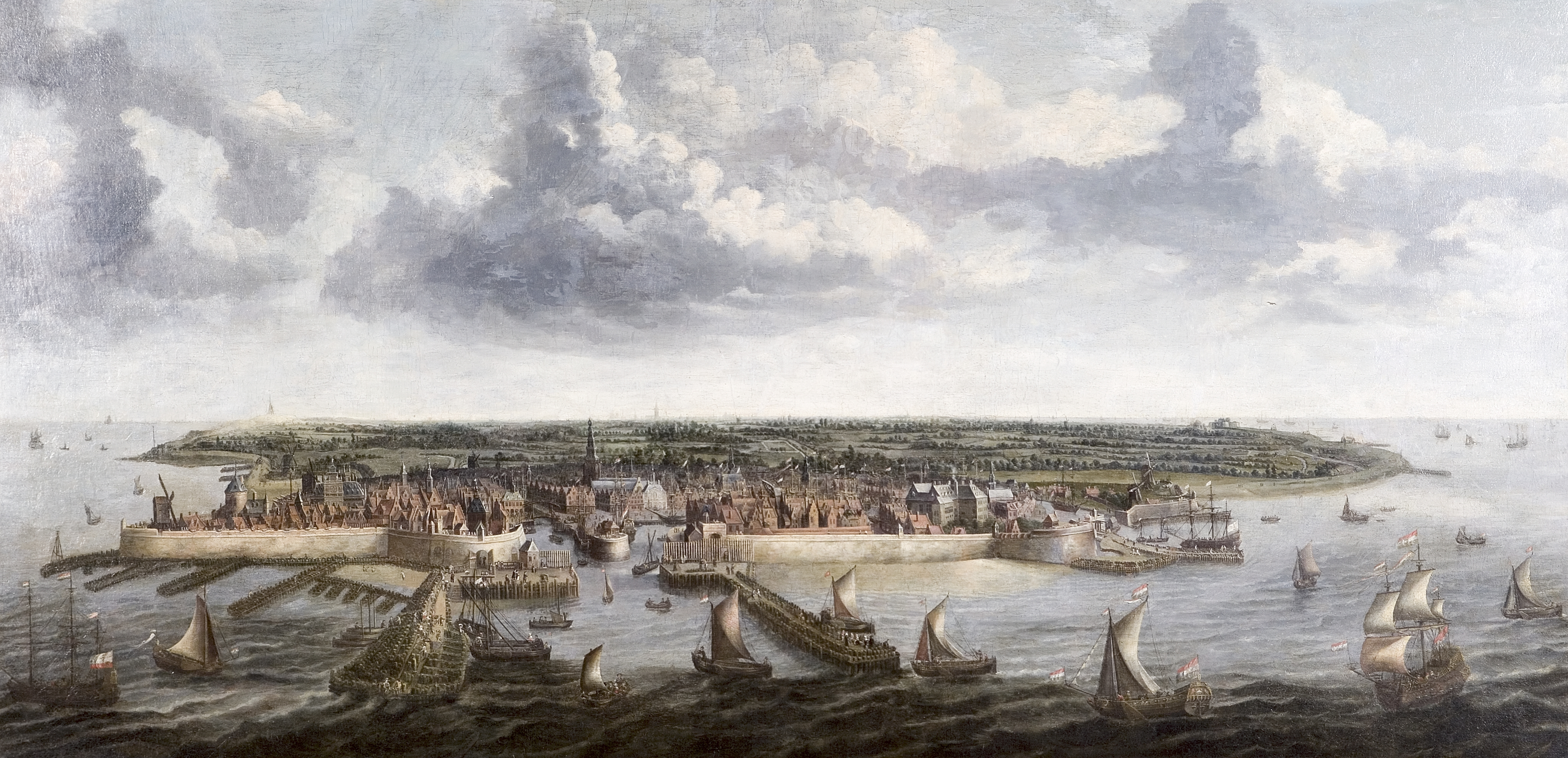 Topografische afbeelding van Vlissingen uit 1669.